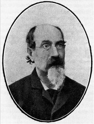 Antonio Zannoni (1833 – 1910) è stato un architetto, ingegnere e archeologo italiano.